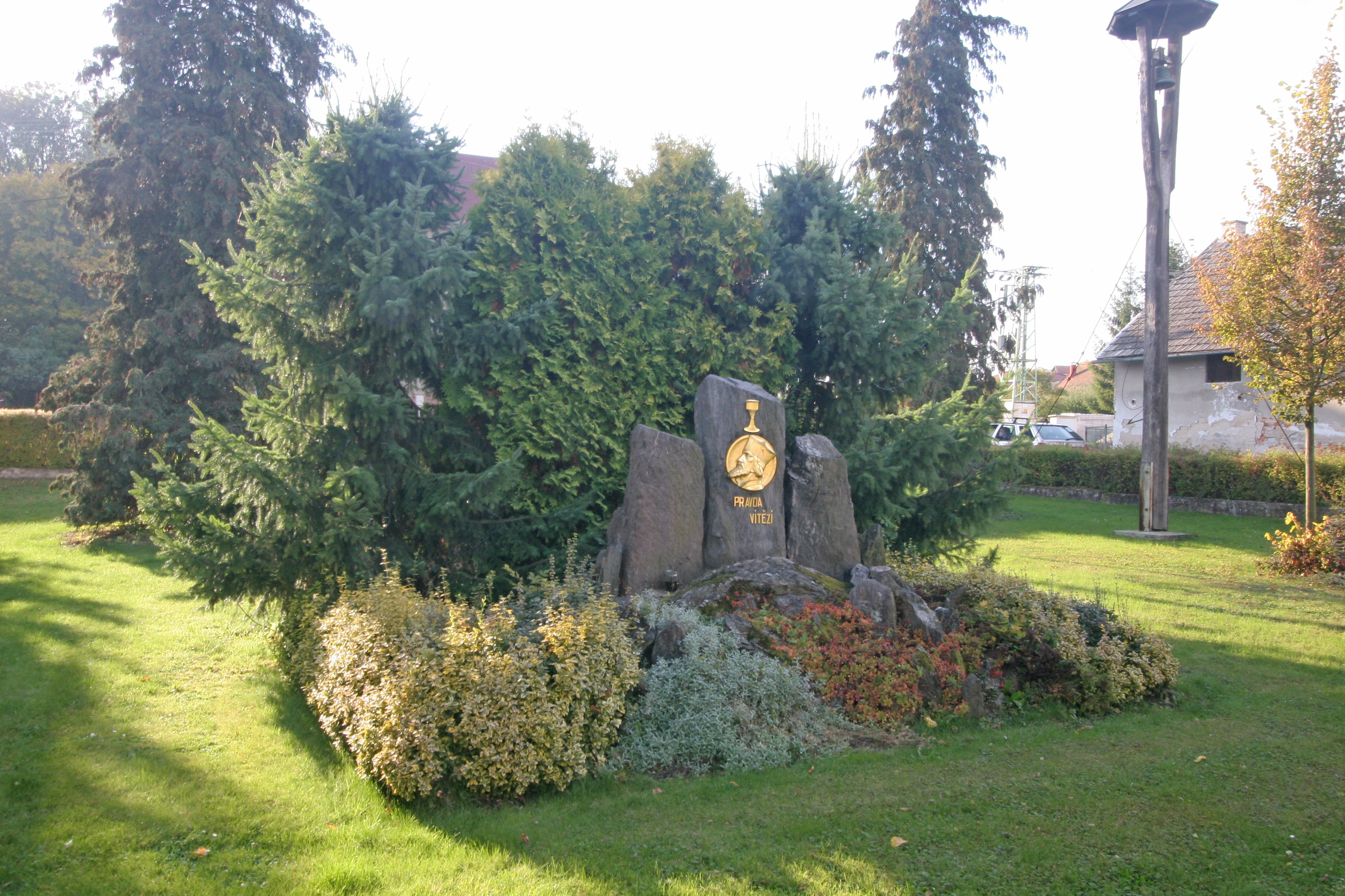 Jílovice pomník Mistra Jana Husa